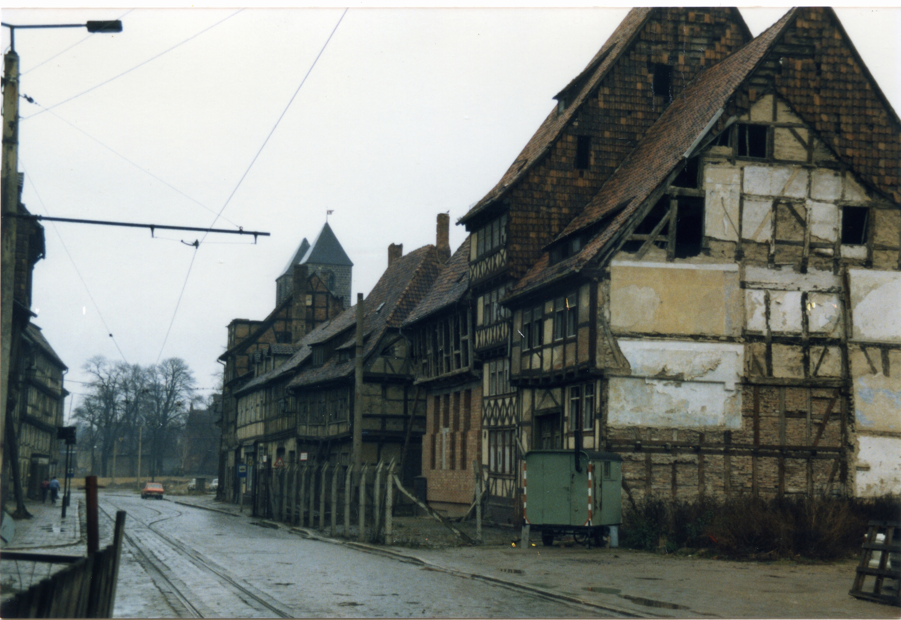 Halberstadt in der DDR-Zeit 1985, Häuser die dem Verfall preisgegeben und abgerissen wurden. Teilweise wurden vom Staat auch intakte Fachwerkhäuser mutwillig zerstört.